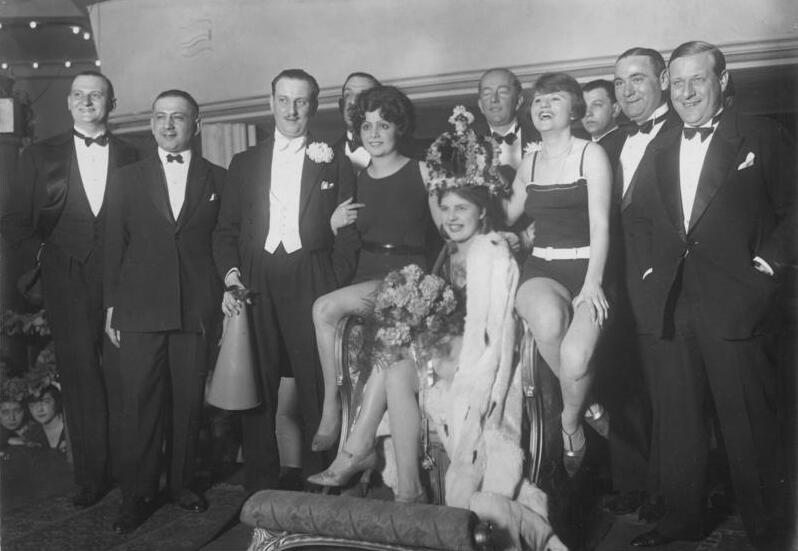 Die Schönheitskönigin Deutschland die am Sonnabend im Sportpalast gewählt wurde mit den Herren von der Jury (Filmregisseur Fritz Lang, Prof. Joseph Oppenheimer, Bildhauer Ernesto de Fiori und Prof. Retzlaff und der Conferenzier Max Ehrlich) und dem zweiten (rechts) und dem dritten (links).